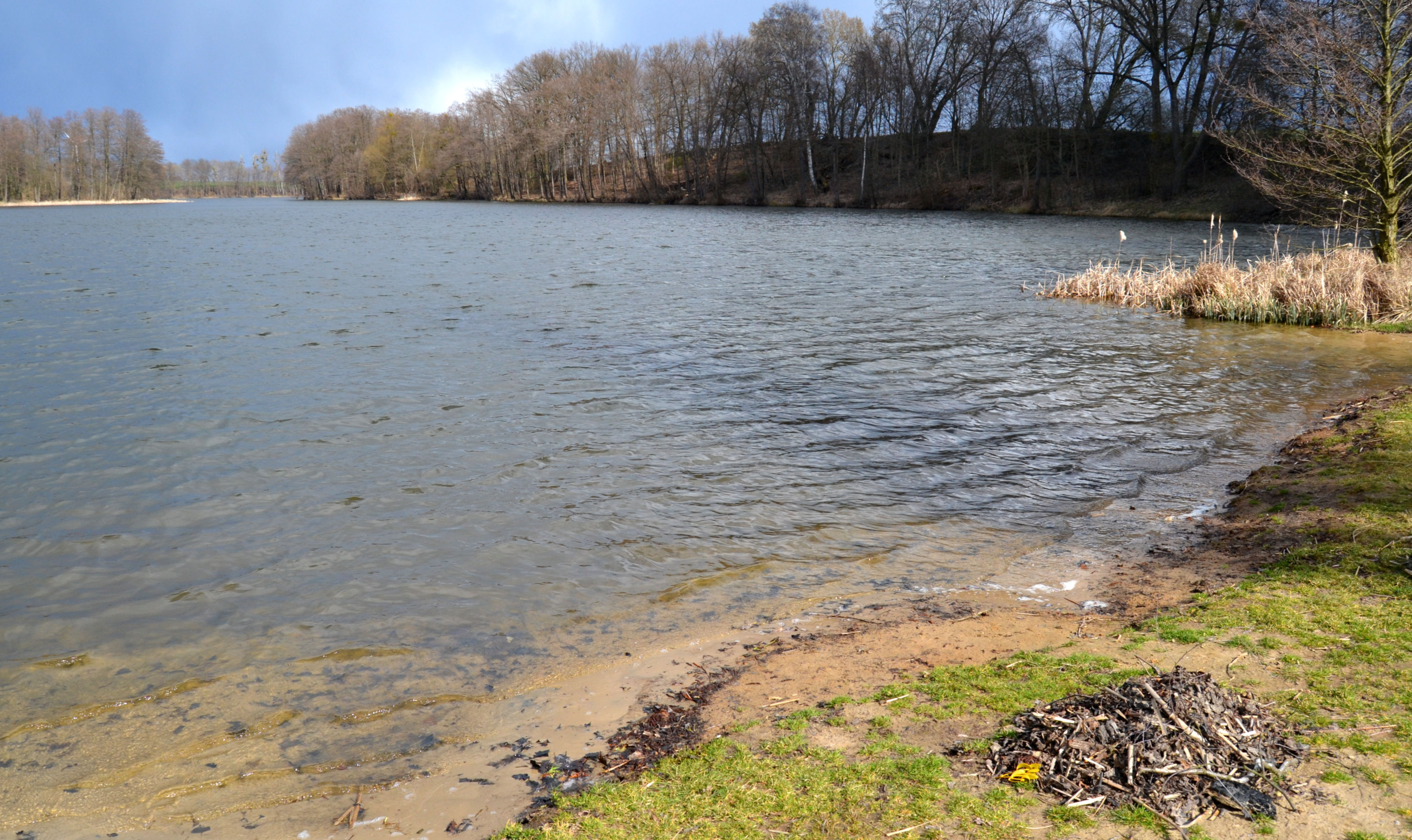 Fotoprojekt – Zwischen Berlin und Oder 2015 Photo project “Between Berlin and River Oder 2015” This template will categorize into Category:Zwischen Berlin und Oder 2015.